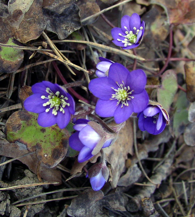 Bl�sippor idag p� v�r kulle, den 8 mars, och n�stan en hel m�nad tidigare �n f�rra �ret ! De v�xer p� sydsidan av kullen och just h�r brukar de alltid vara tidiga men s� tidigt som i b�rjan av Mars har jag aldrig varit med om f�rut ! The wild flowers Hepatica nobilis are already blooming in the area where I live and its ONE MONTH earlier from last year! Global warming for sure!